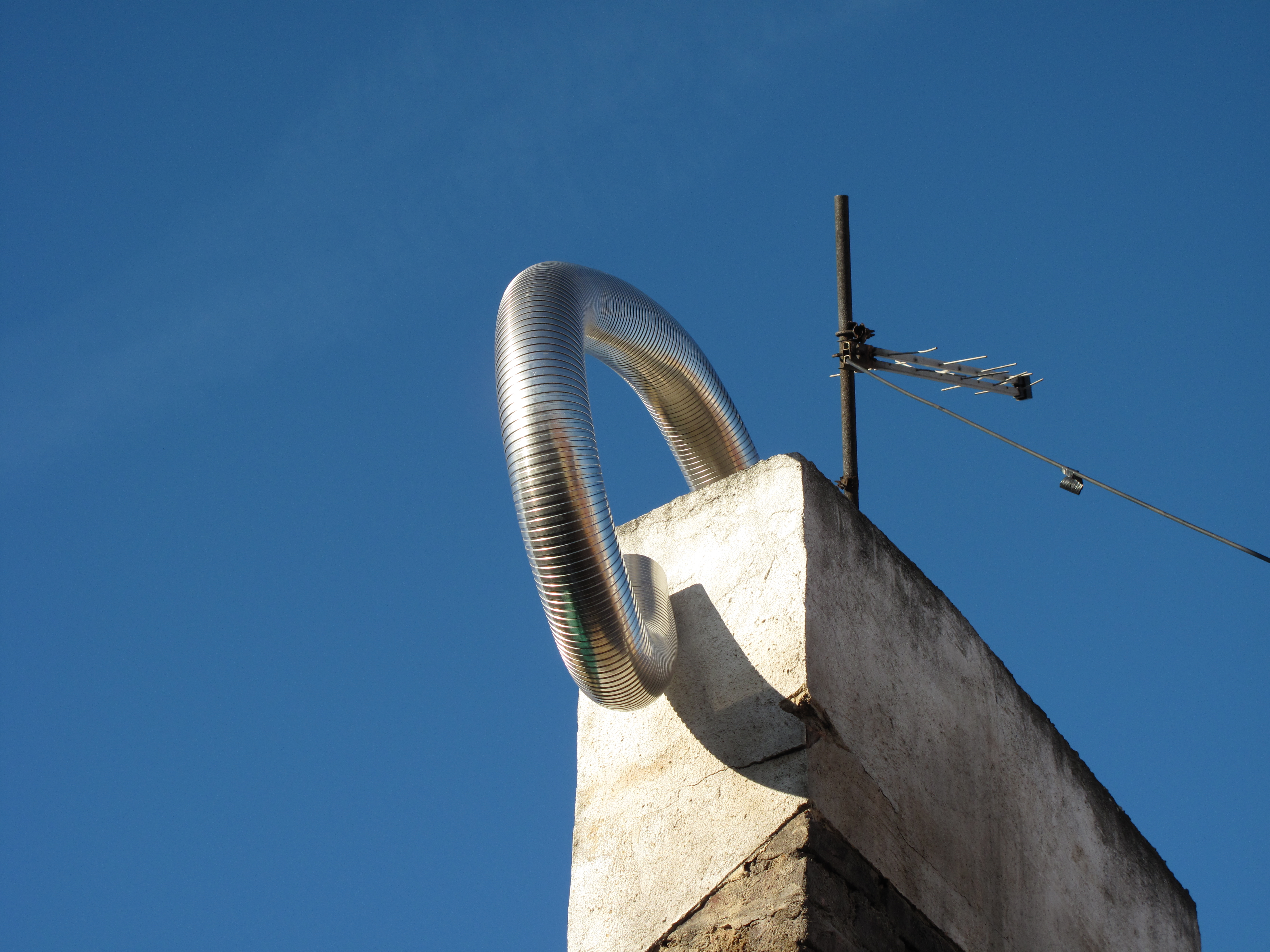 Komínová vložka trčící z komínu.